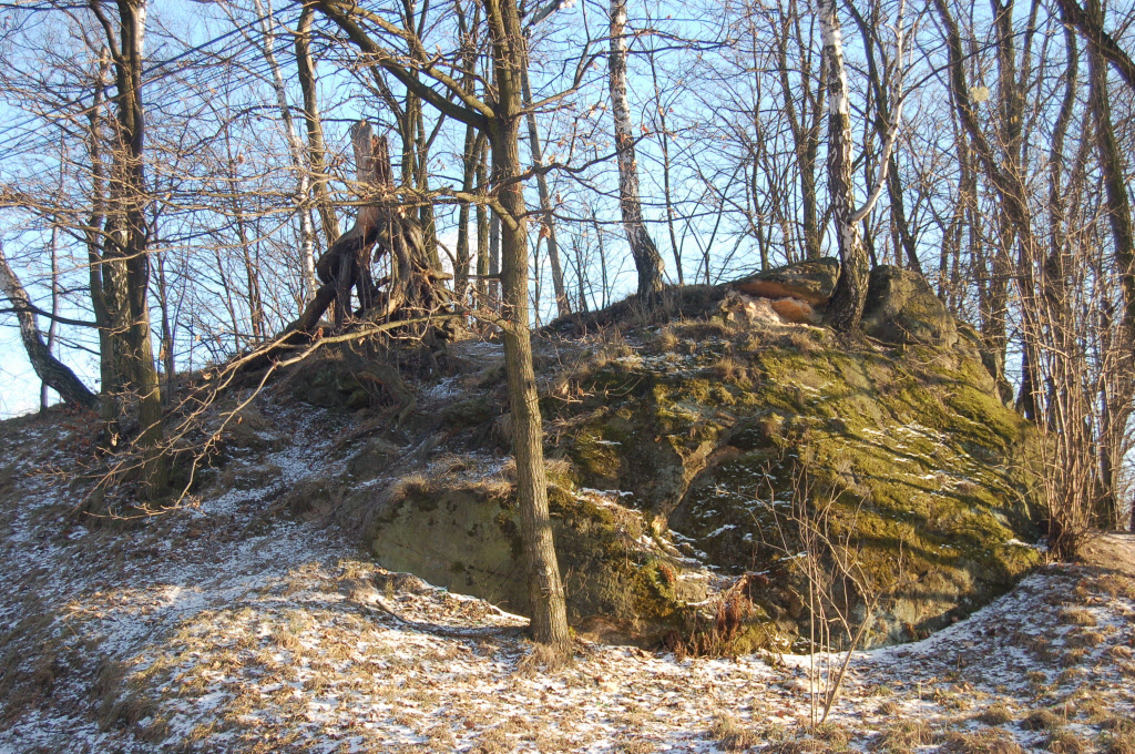 Tenczynek skałka karbońska